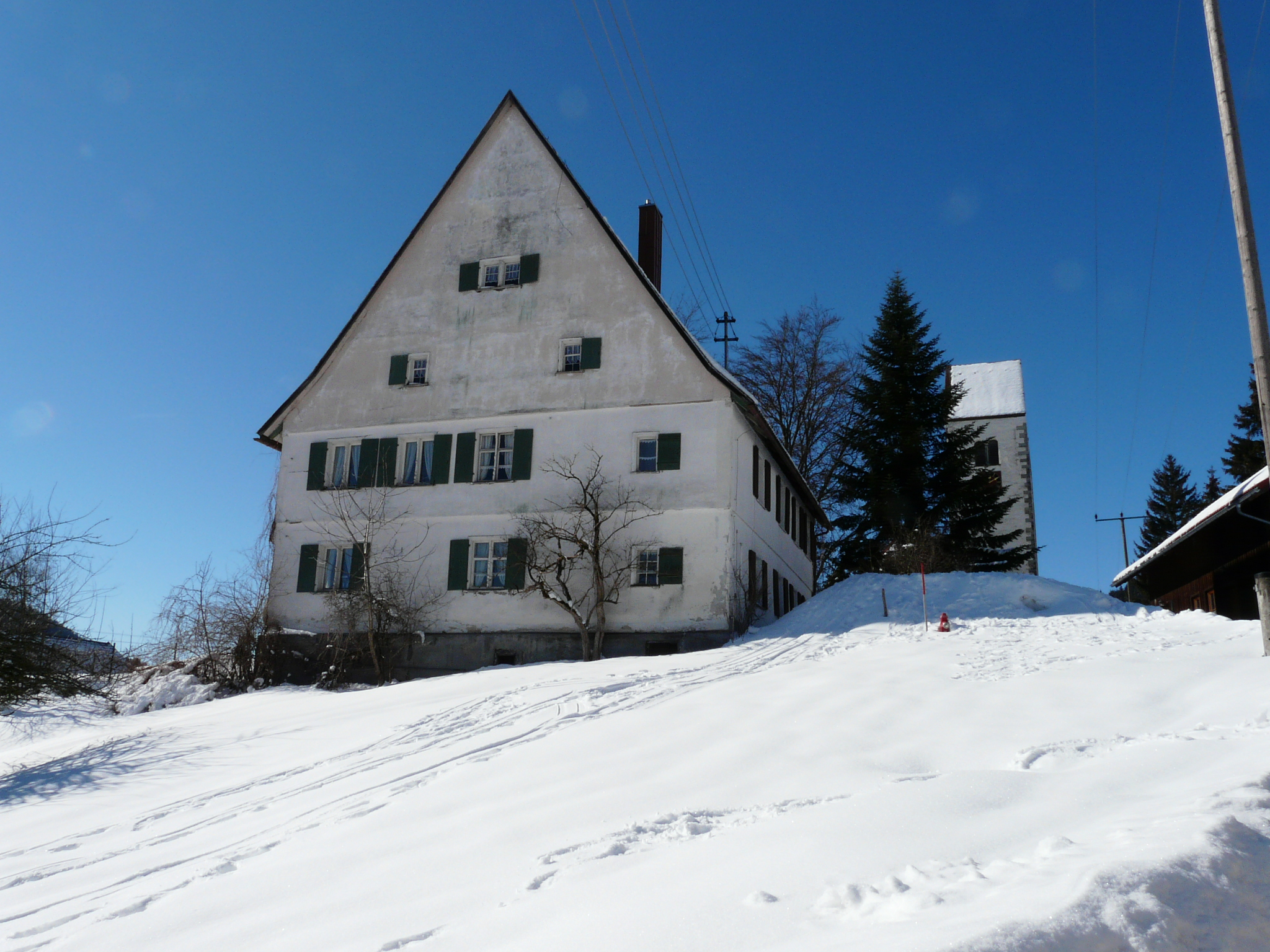 Pfarrhof in Ebratshofen, Grünenbach